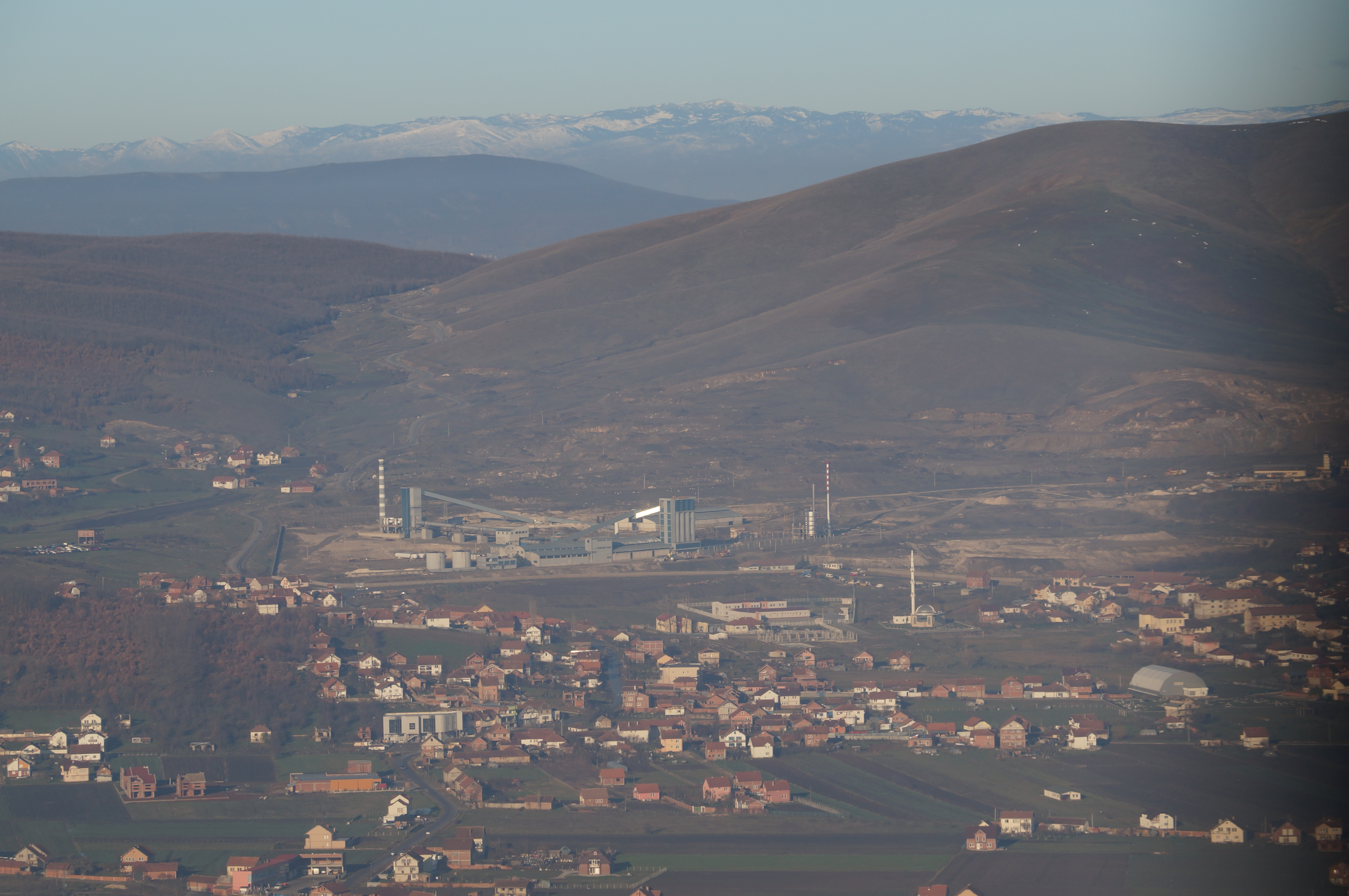 Magura: Mine